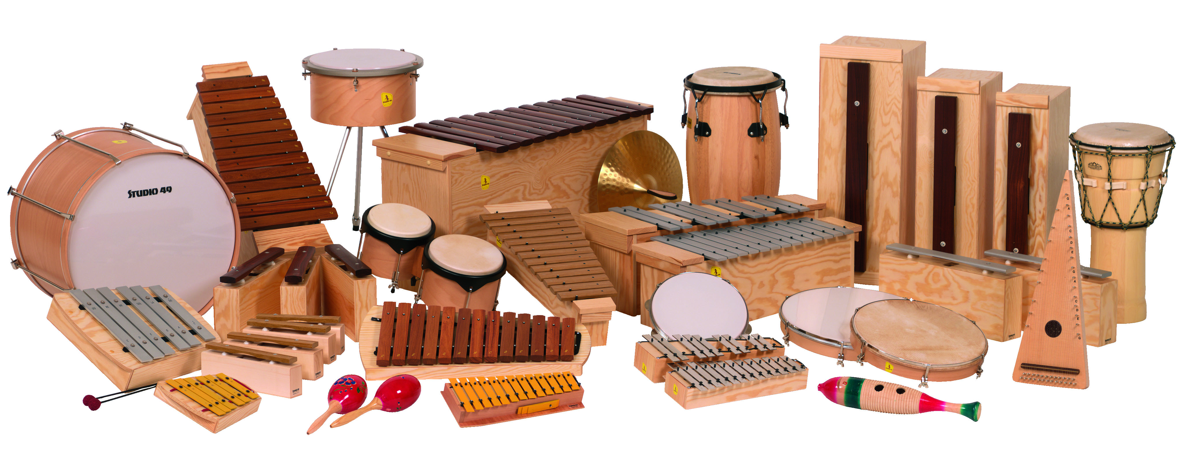 Détail de l'instrumentarium du Orff-Schulwerk de la société Studio 49